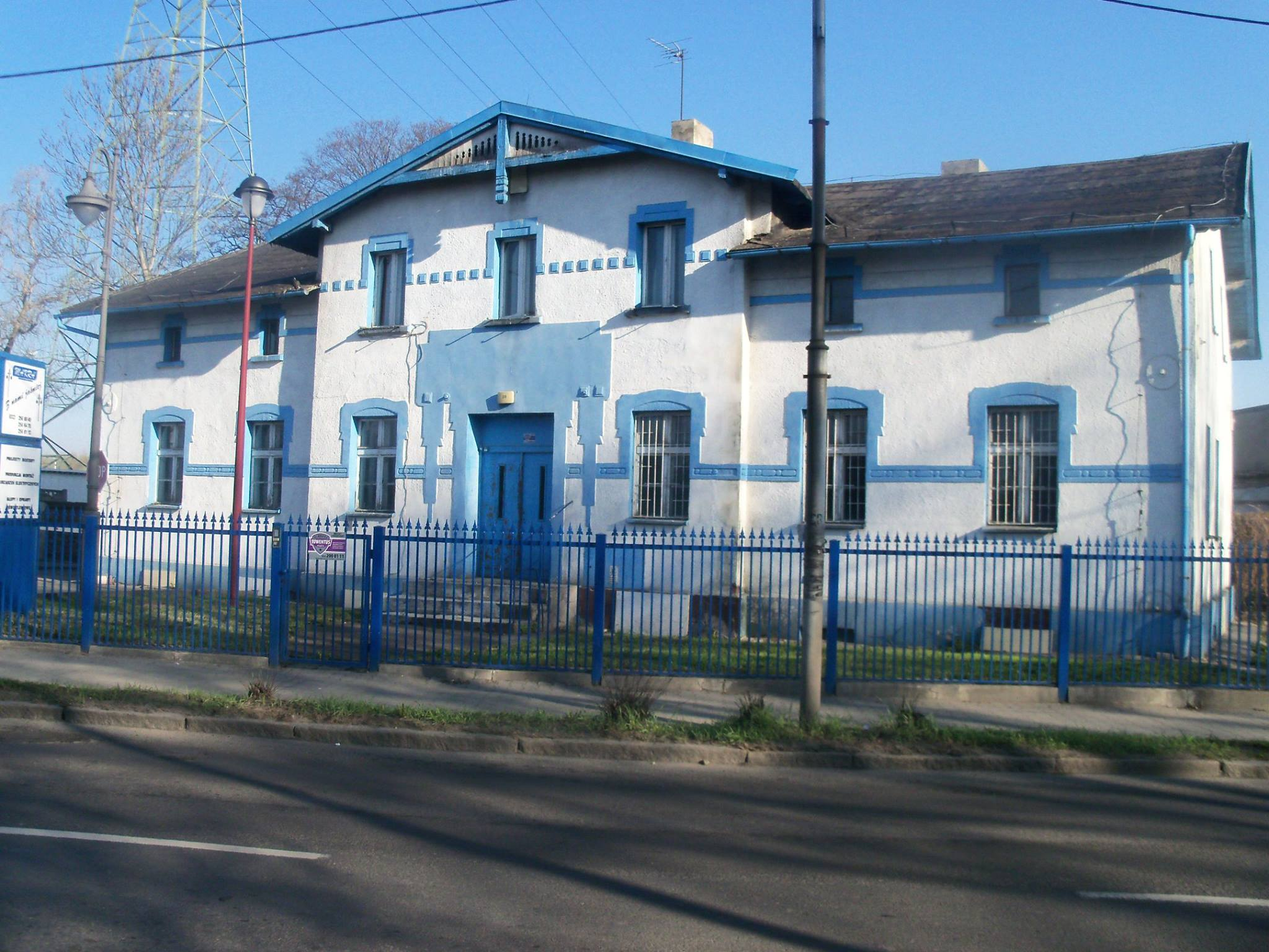 budynek przy ul. gen. H. Le Ronda 28 w Katowicach-Dąbrówce Małej